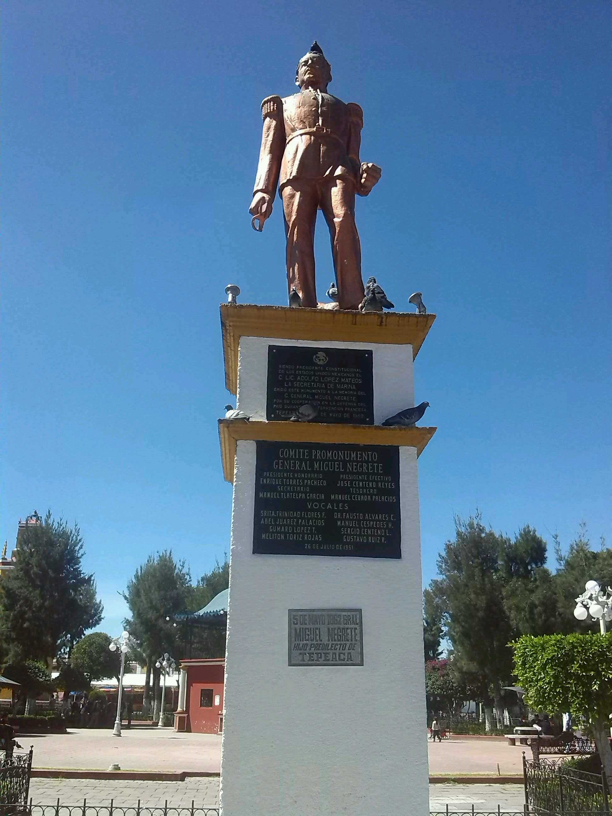 Monumento a Miguel Negrete en Tepeaca